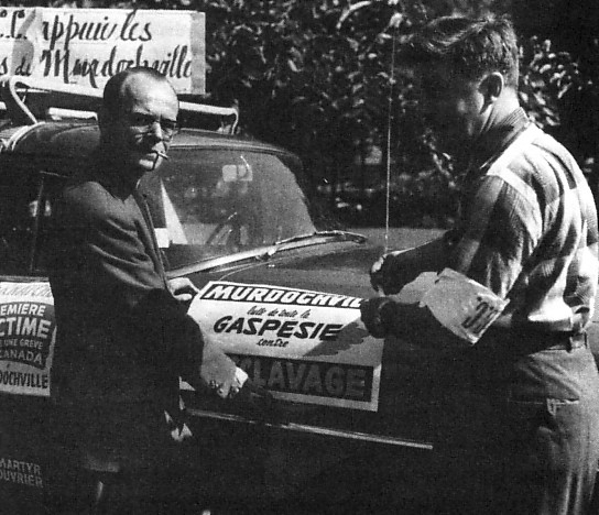 Gérard Picard (à gauche) et Jean Marchand (à droite)